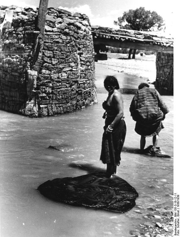 Gyantsefluss, die große Brücke bei Gyantse, Wäscherinnen